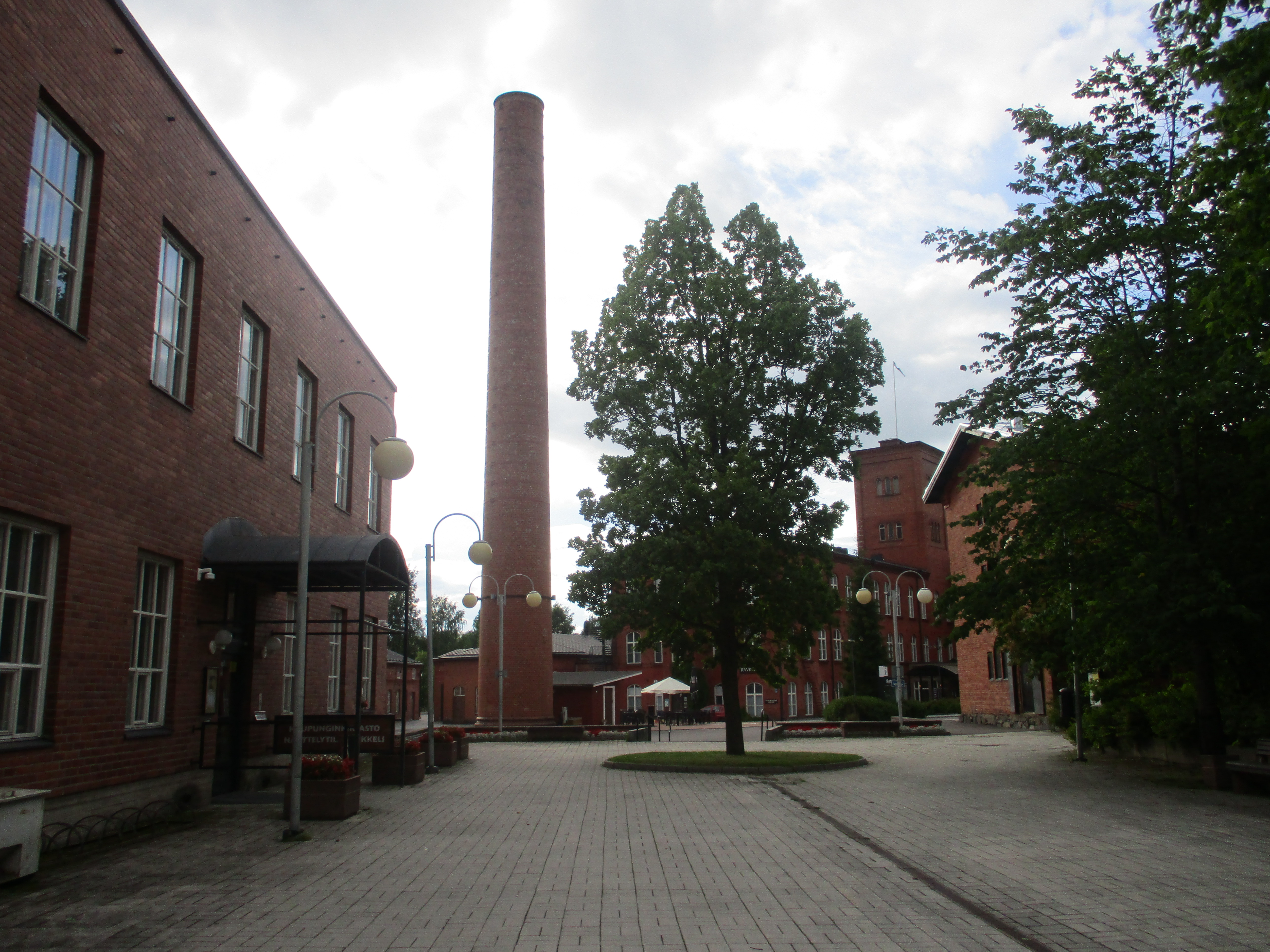 Forssan kaupunginkirjasto